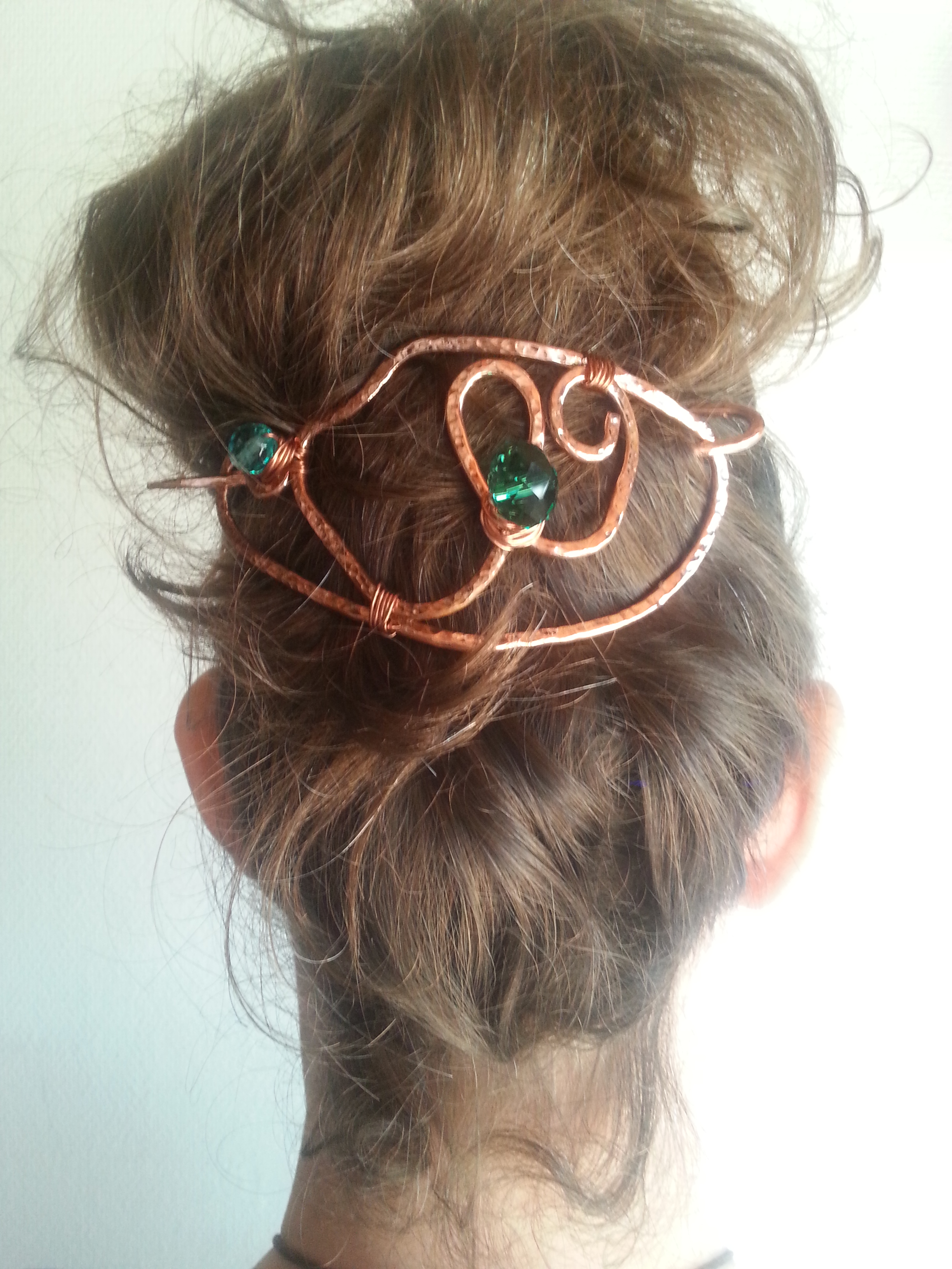 hårdspænde med glas perle i kobber